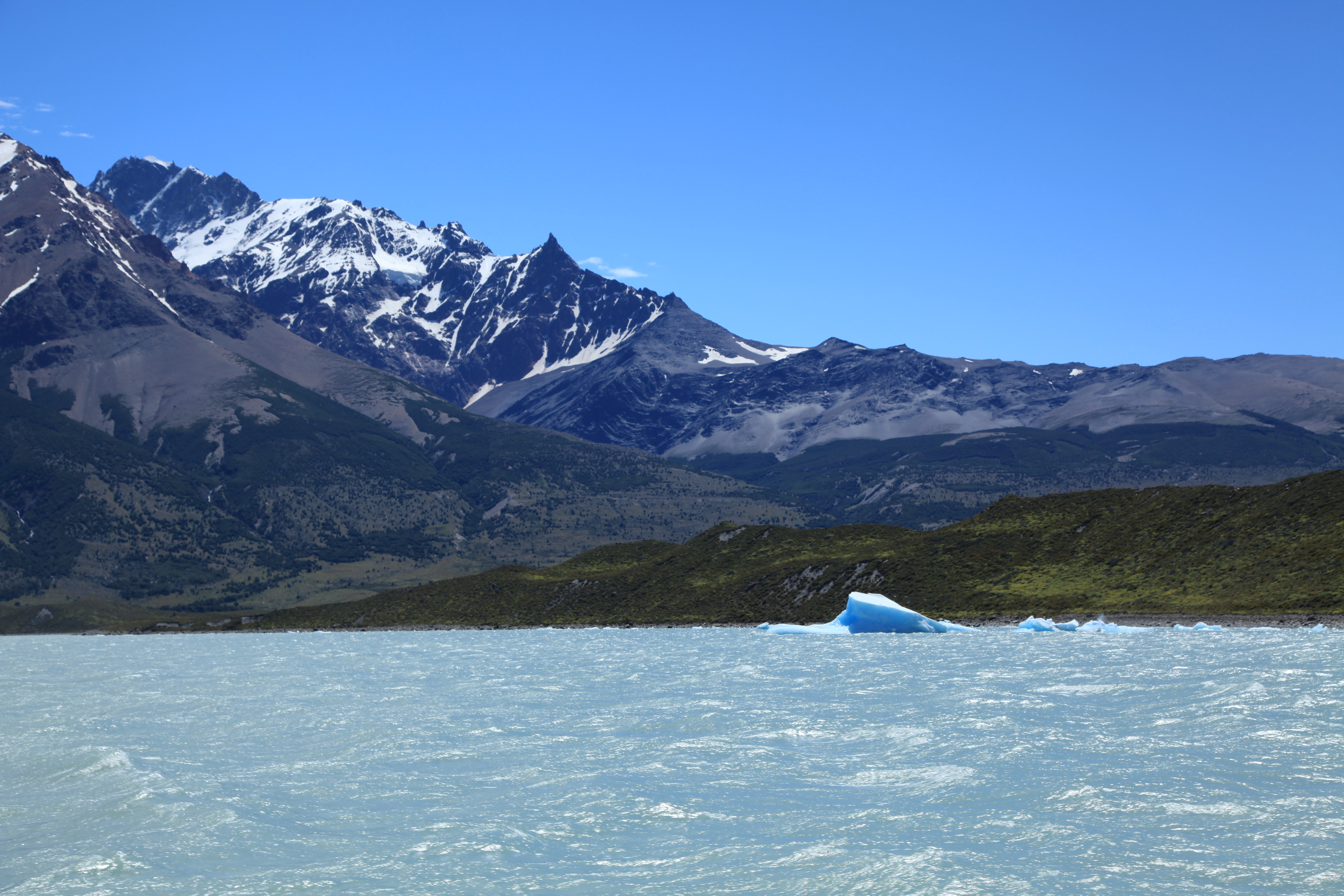 Lake Viedma